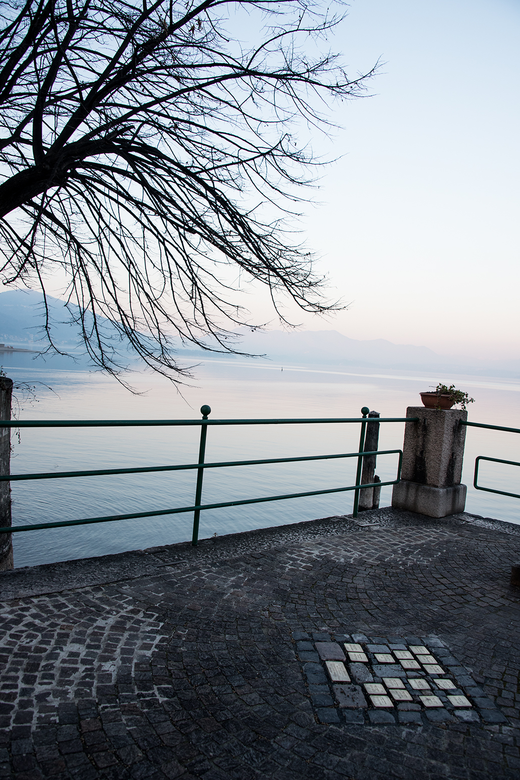 Stolpersteine in Meina